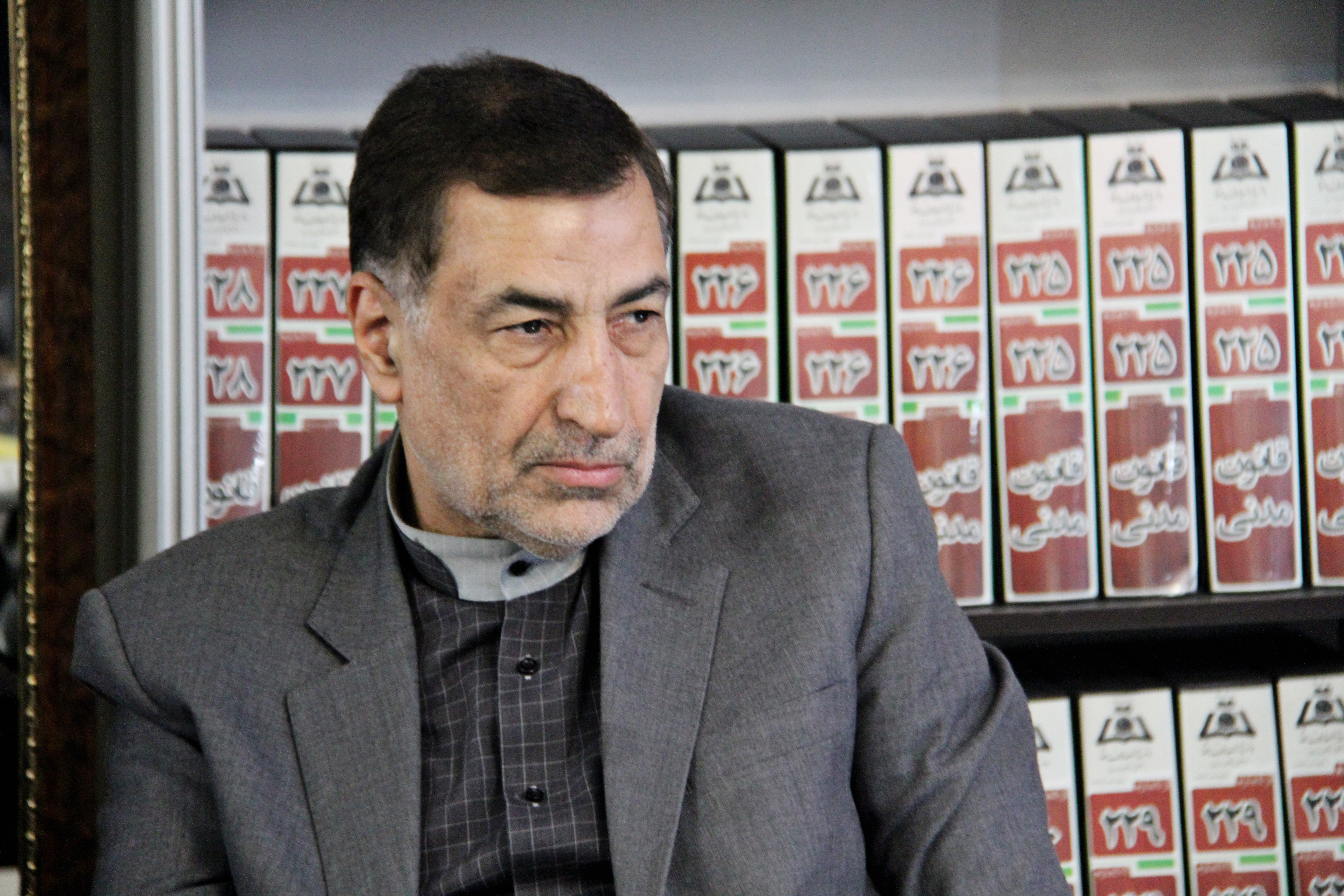 سید علیرضا آوایی در مرکز پژوهشی دانشنامه های حقوقی